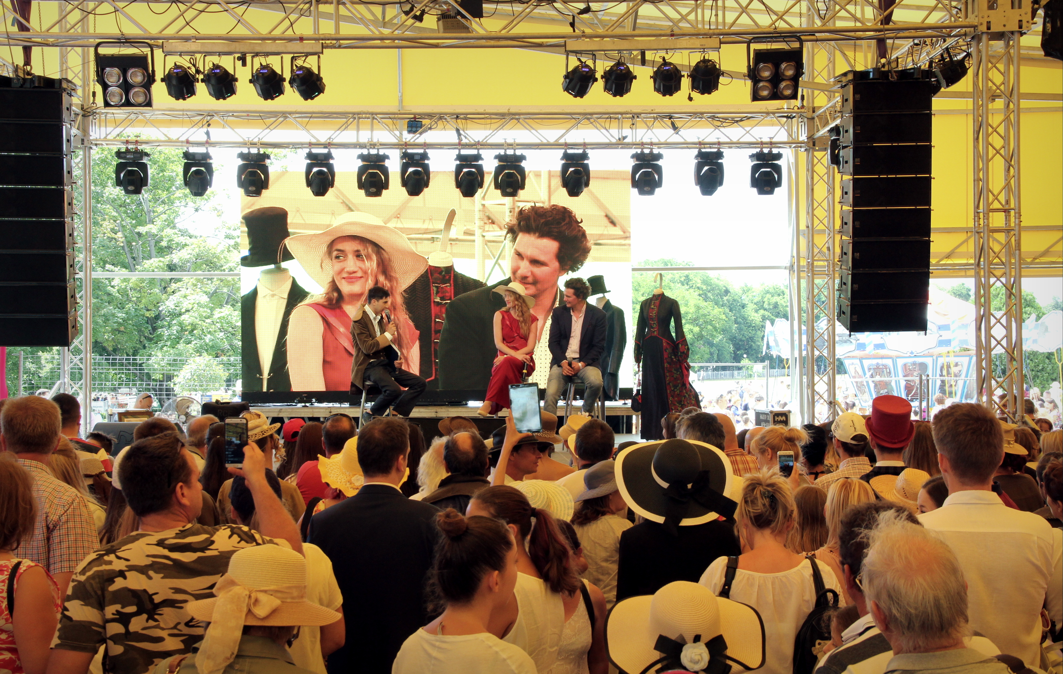 Derby és Kincsem Film Fesztivál. Színpadi beszélgetés a Kincsem c. film főszereplőivel, Petrik Andreával és Nagy Ervinnel, 2017. 07.02-án, a Kincsem Parkban.